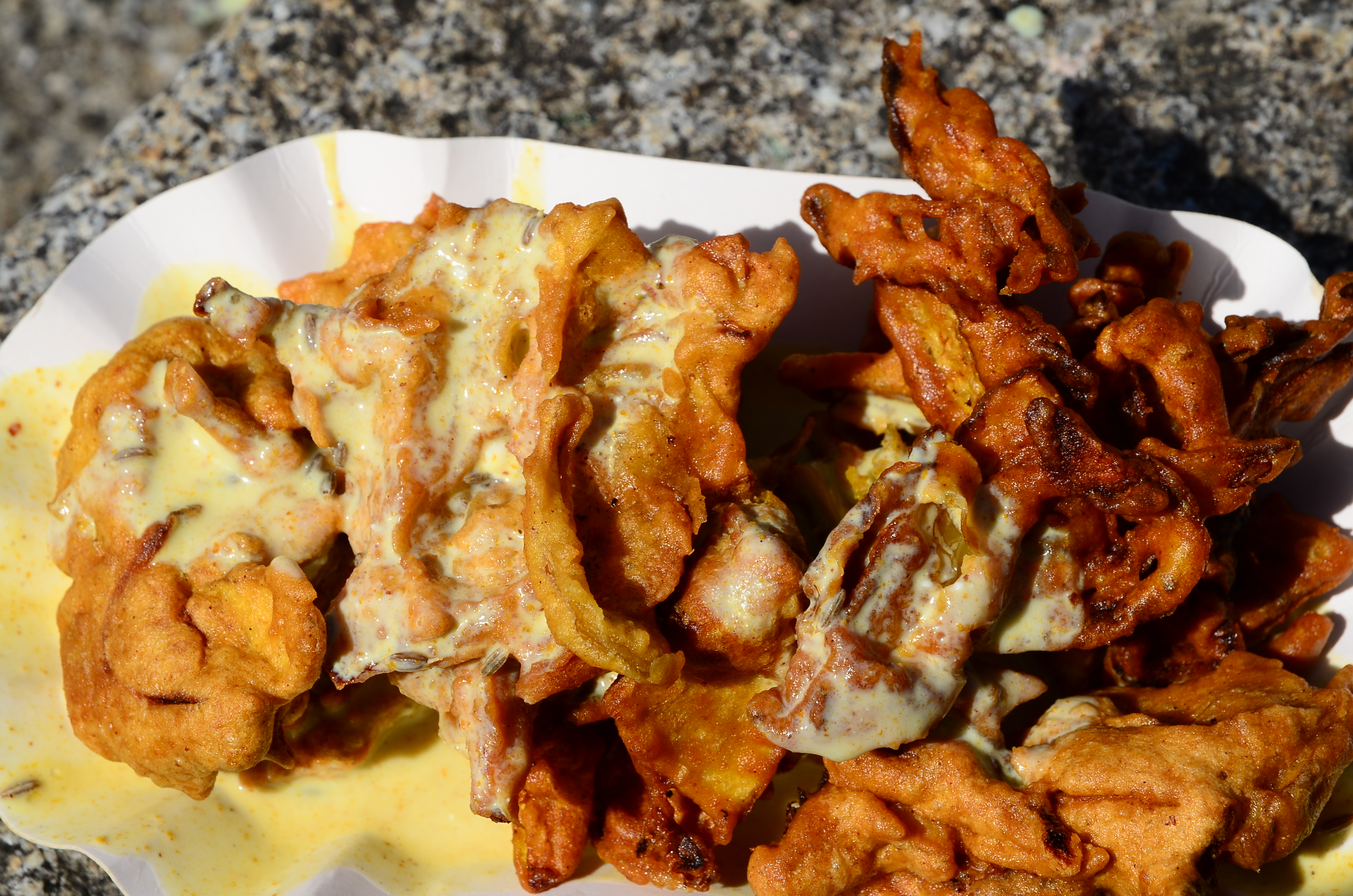 Sechseläuten, Pakora (Kartoffel) mit Joghurt-Curry-Sauce , Limmatquai in Zürich (Switzerland) Sechseläuten in April 2013